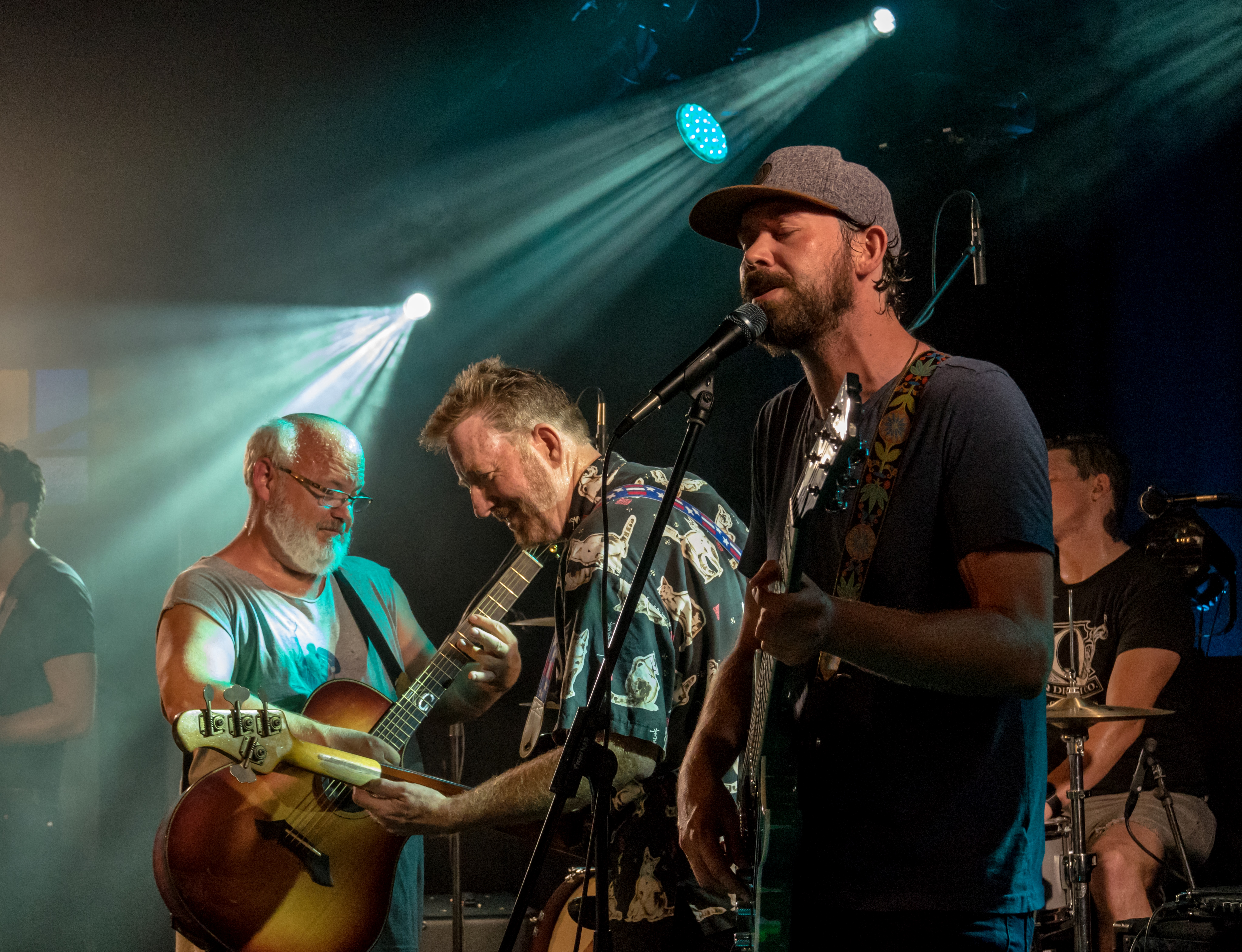 Bilder vom Zelt Musik Festival 2017 in Freiburg im Breisgau Kyle Gass Band